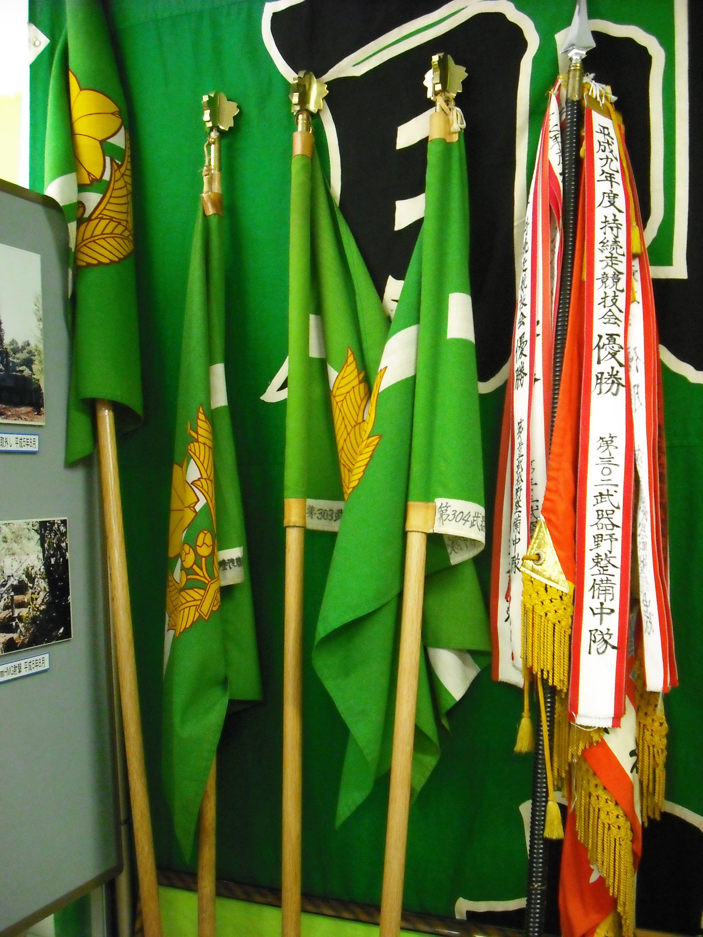 かつて存在していた北部方面武器隊の隊旗及び中隊旗、武器科部隊旗は今では殆ど見ることが出来ない状況のため、参考になるかと